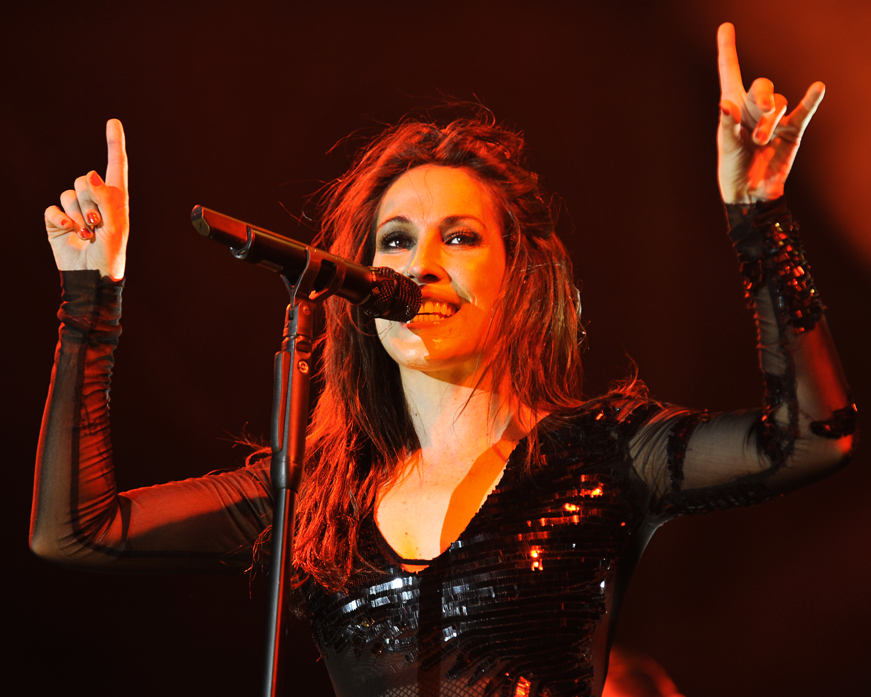 Malú en Jaén (3-10-2014)